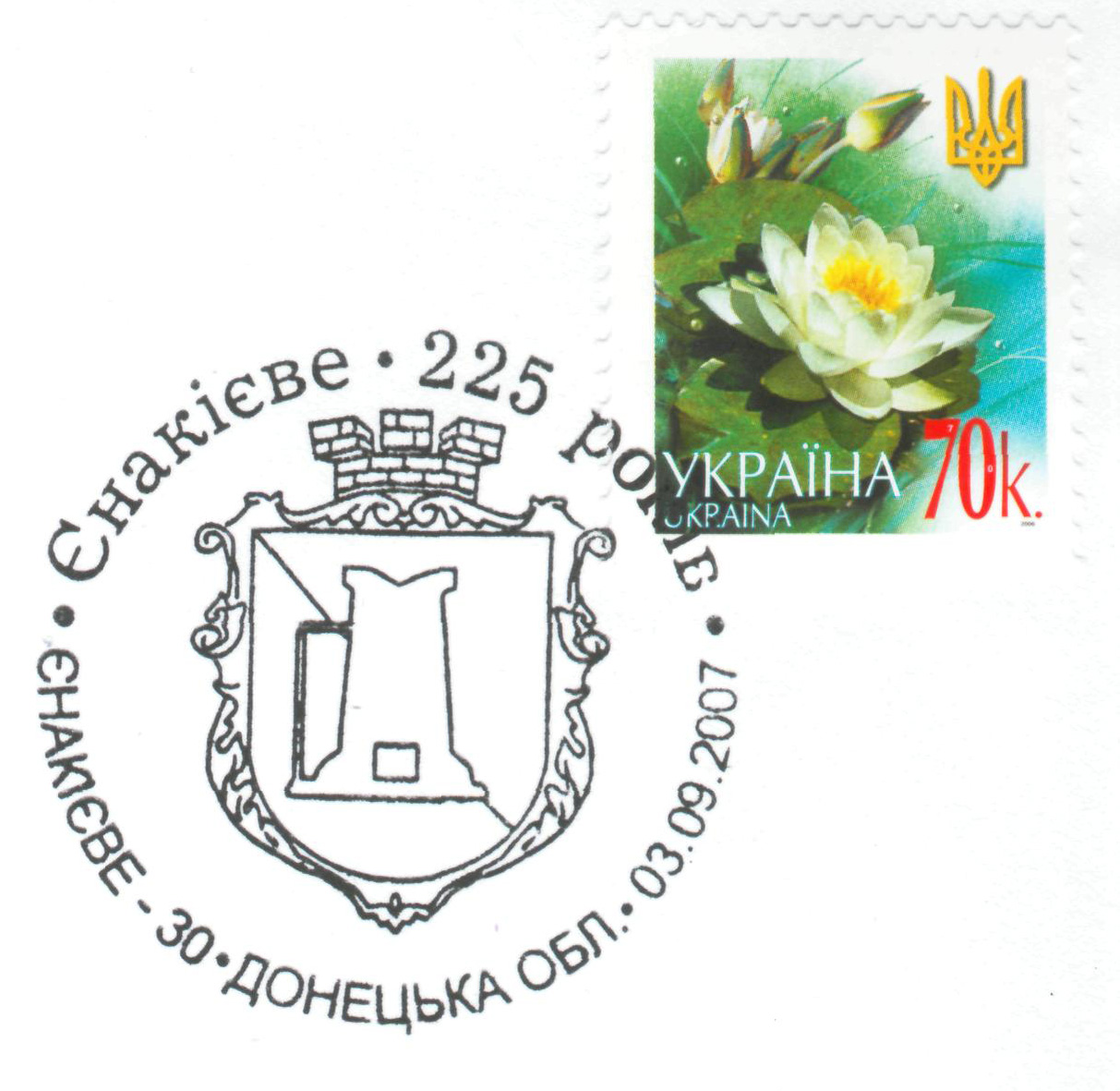 225 лет Енакиево (1782-2007). Cтандартная почтовая марка Украины 2006 г. номиналом 70 копеек. Спецгашение: 3 сентября 2007, Енакиево.